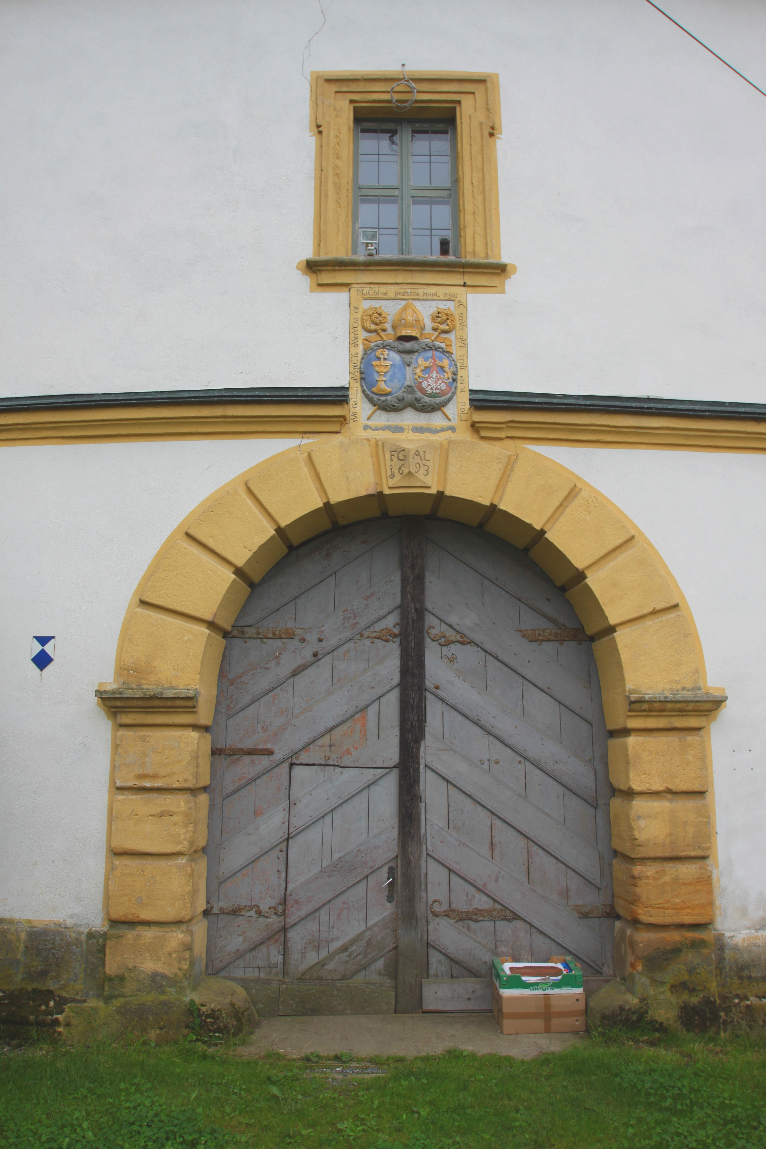 Der Gutshof Nassanger ist ringförmig dreigeschossig, um einen elliptischen Hof angelegt. Er ist ein ehemaliger Wirtschafts- und Lagerhof des Klosters Langheim, 1692/93, und wurde vermutlich nach Plänen von Leonhard Dientzenhofer gebaut. Baudenkmal D-4-78-139-223